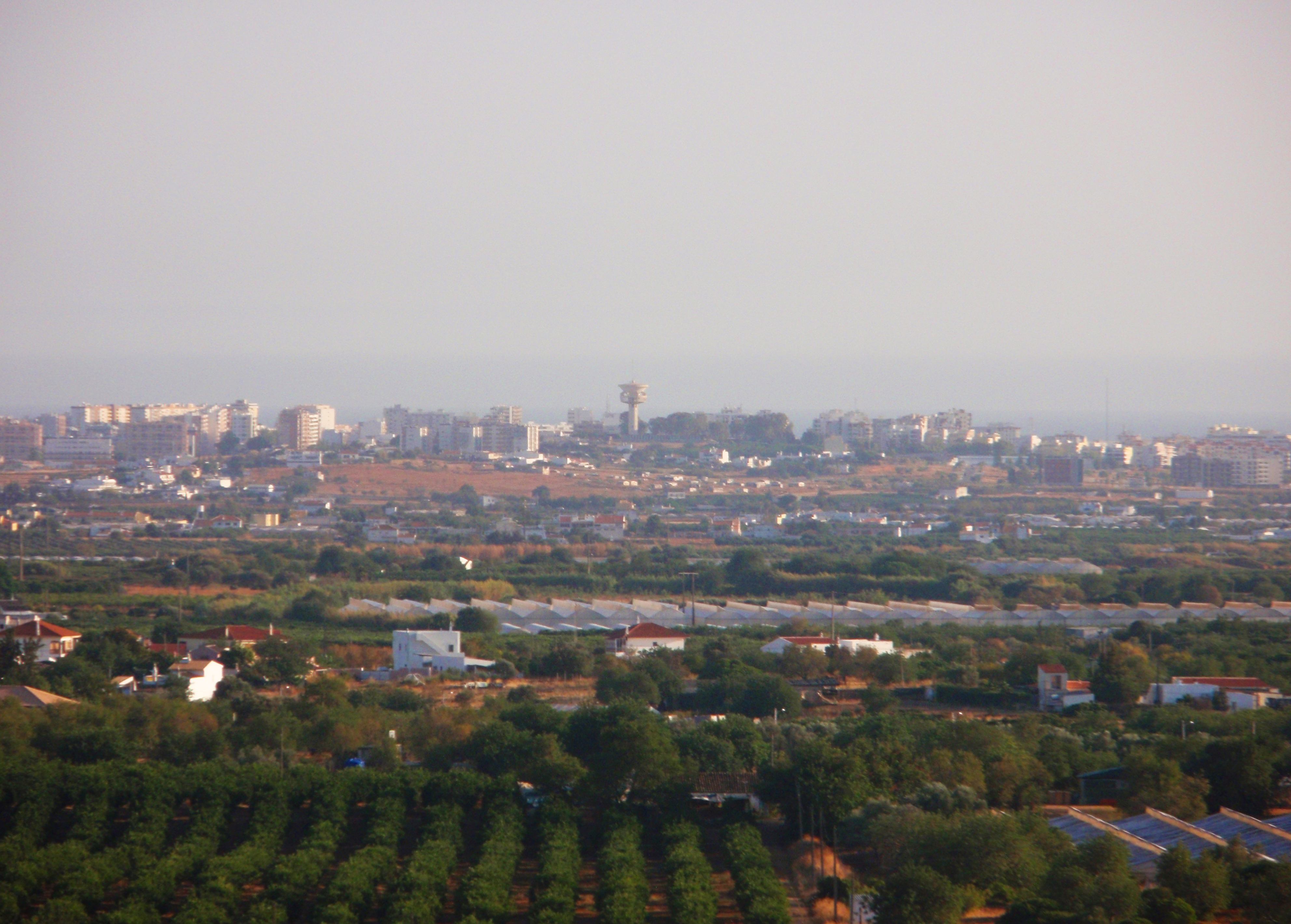 Faro (Portugal)